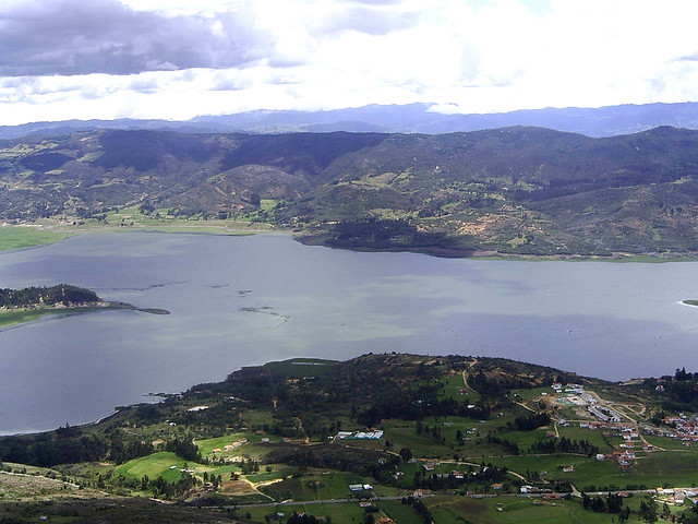 Guatavita en lengua chibcha quiere decir fin de la labranza o punto de la sierra